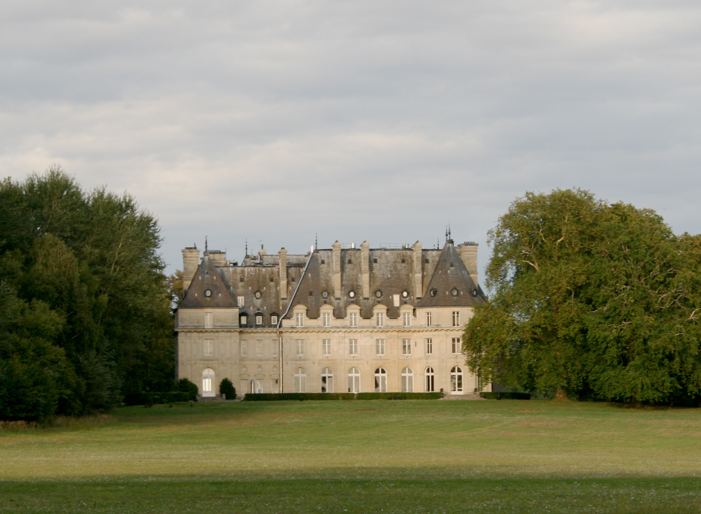 Château des Bonshommes 1 - Francport